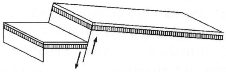 Pultscholle